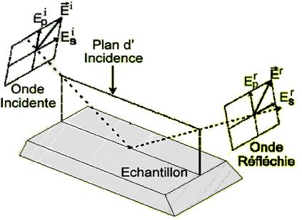 Définition du plan d'incidence pour l'ellipsométrie